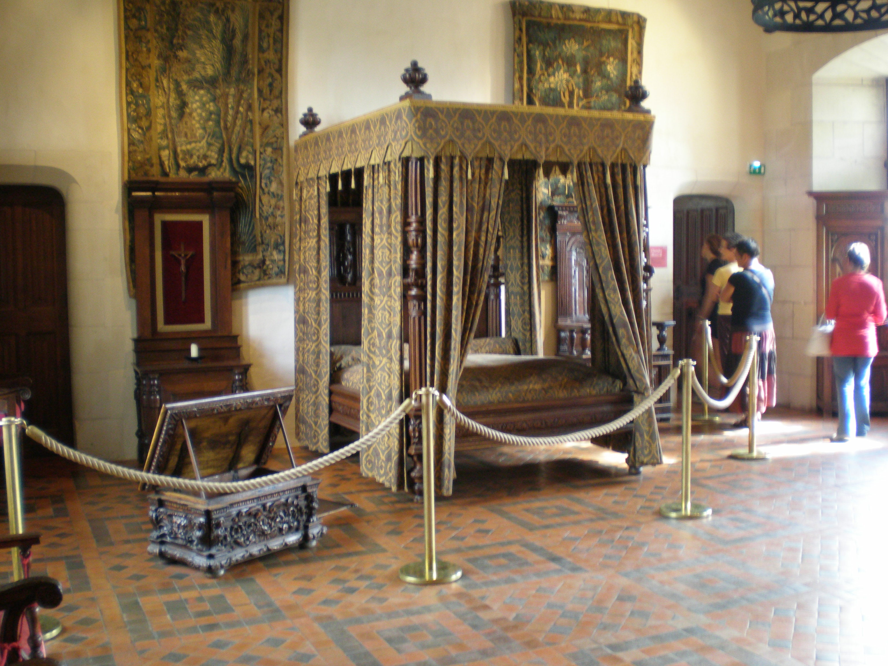 Intérieur du chateau d'Amboise